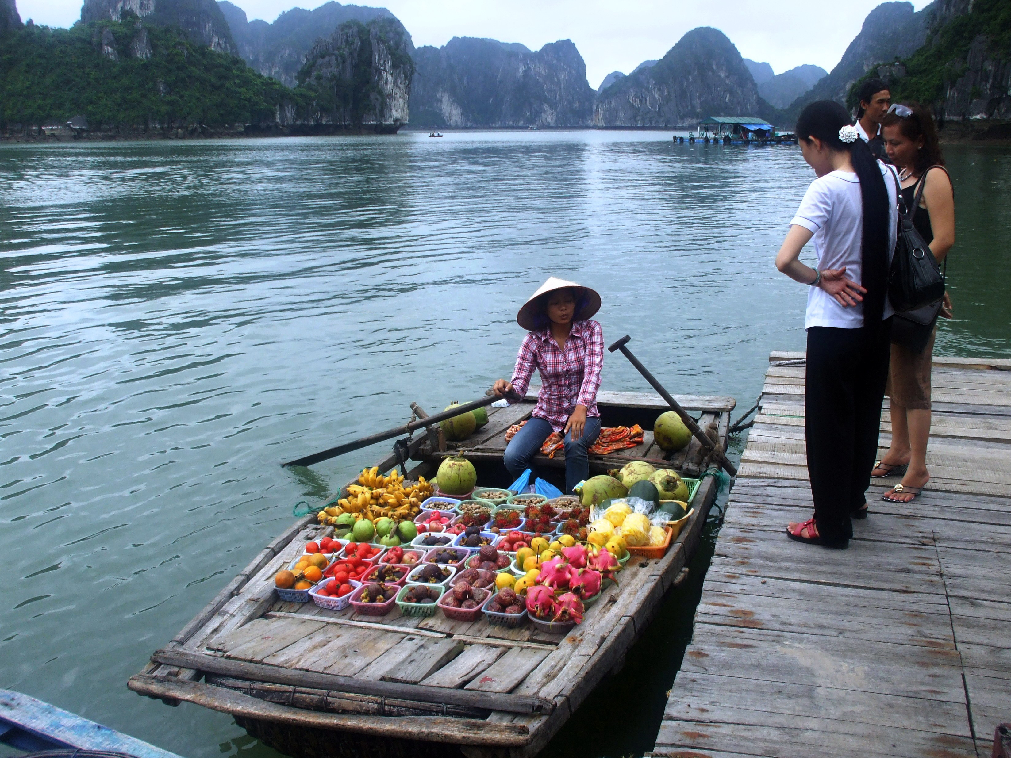 Thuyền bán trái cây trên vịnh Hạ Long (Quảng Ninh, Việt Nam).